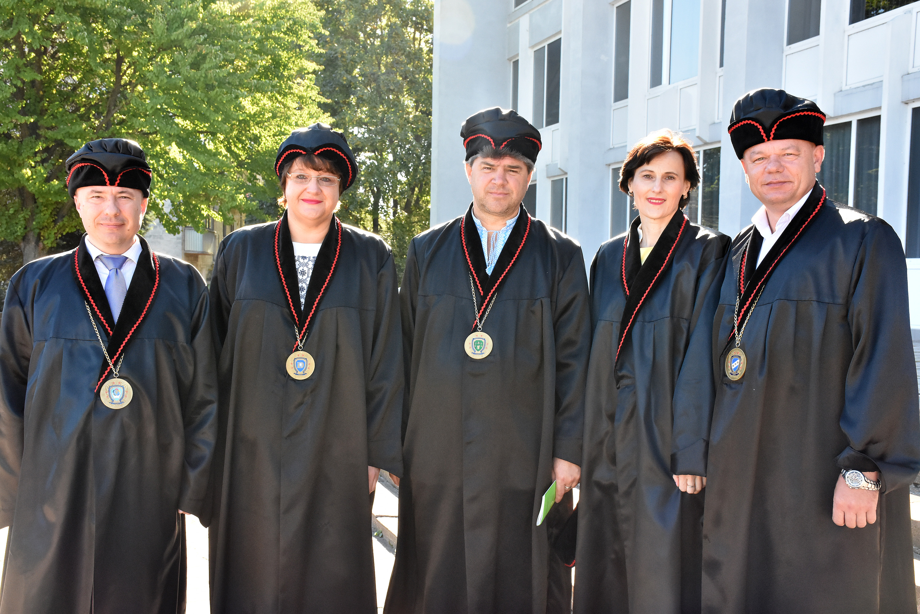 Декани Тернопільського державного медичного університету імені І. Я. Горбачевського на посвяті в студенти 31 серпня 2016 року. Зліва направо: Петро Сельський, Світлана Бойцанюк, Дмитро Коробко, Оксана Боярчук, Роман Свистун.